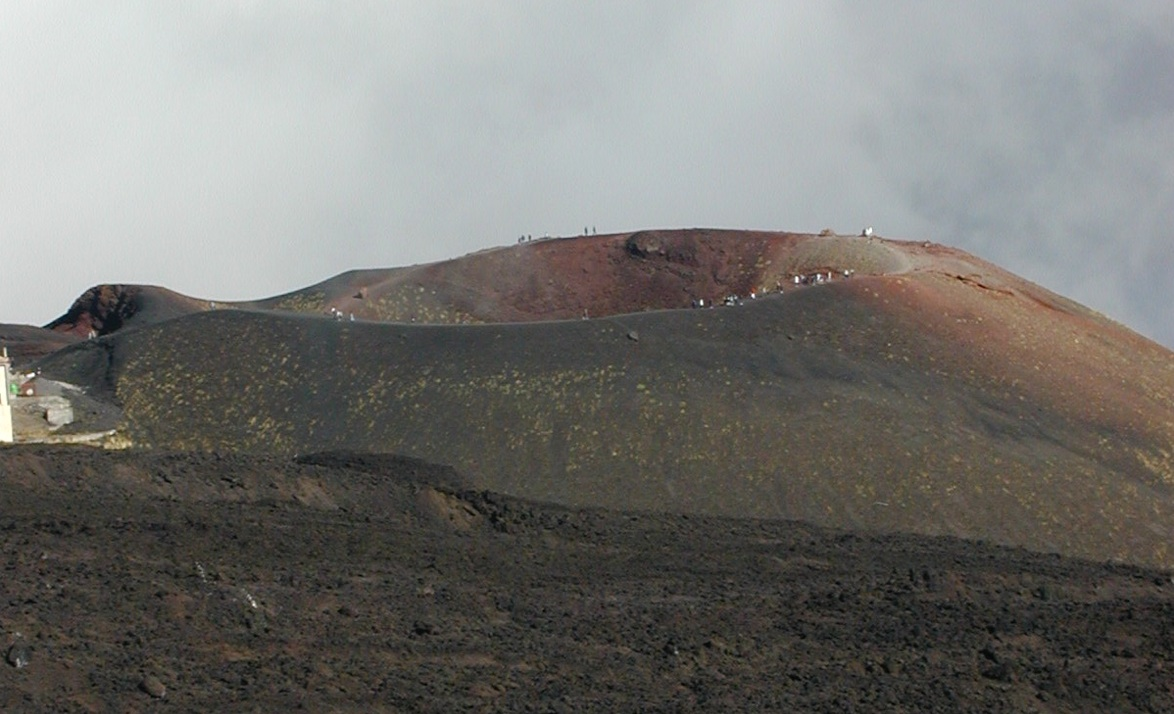 Etna, Sicilia, Italia